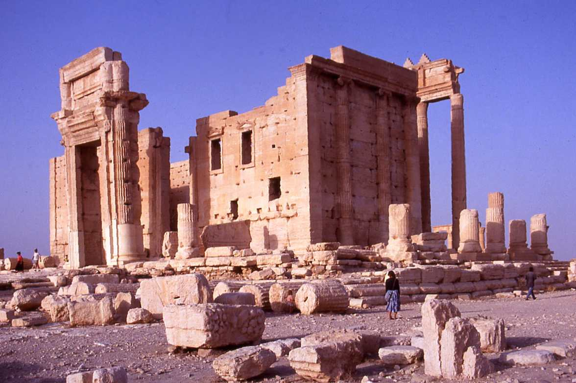 Palmyre. Temple de Bel/Baal, Ier siècle. Photo Ginolerhino 1992.